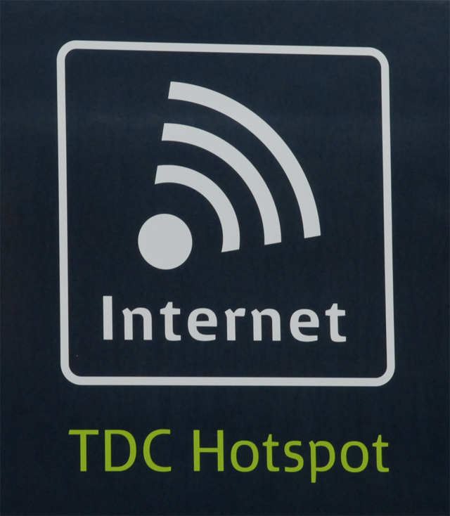 Logo internet hotspot van Deense treinen (DSB) op 22 mei 2009